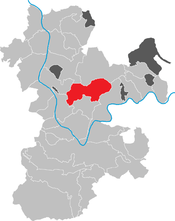 Karte von Mönchberg im Kreis Miltenberg, Bayern, Deutschland.